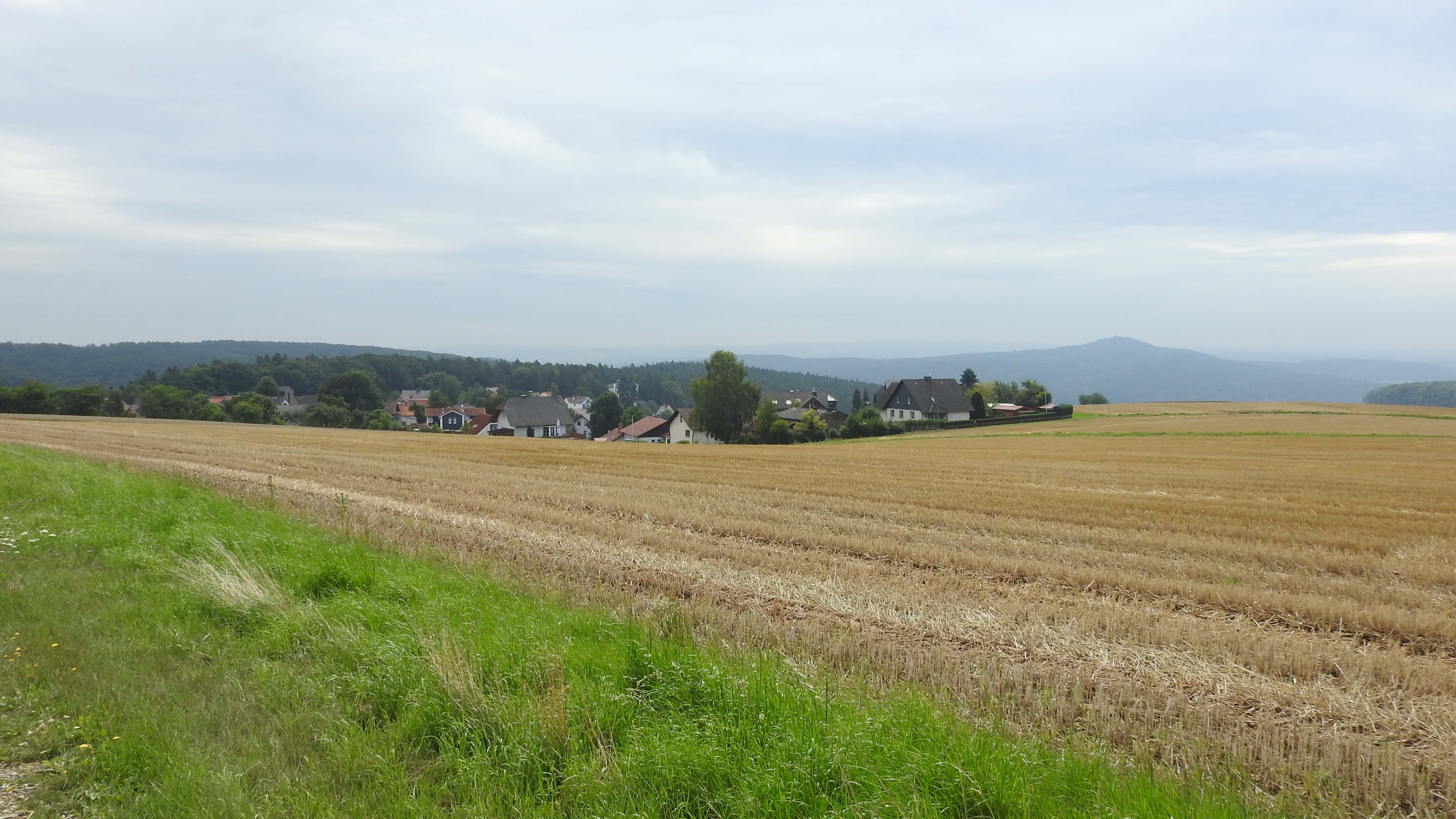 Wenzigerode, Bad Zwesten, von Nordwesten